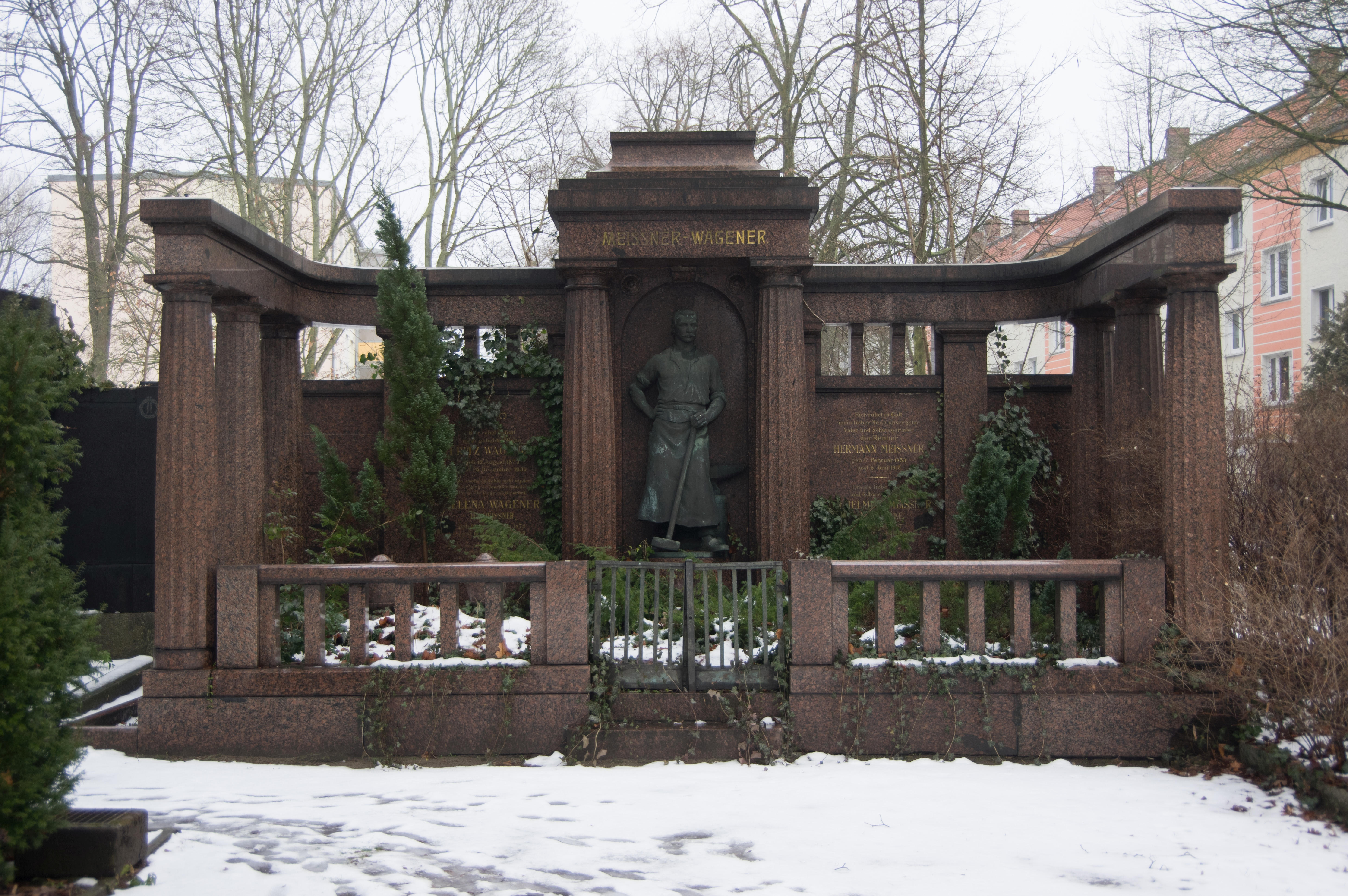 Berlin-Adlershof. Der Friedhof Adlershof befindet sich in dem Bezirk Treptow-Köpenick.